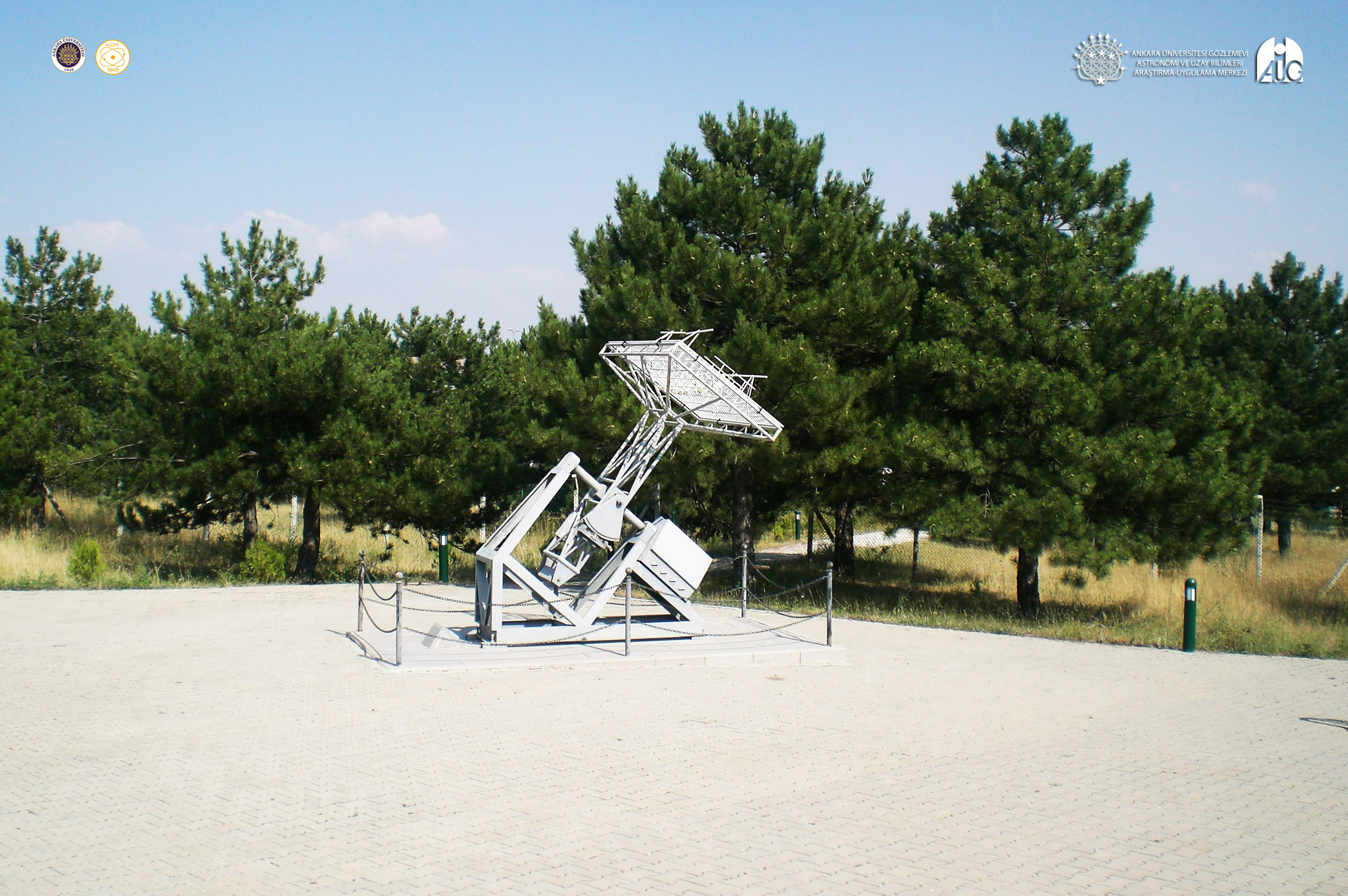 Ankara Üniversitesi Gözlemevi Radyo Teleskobu